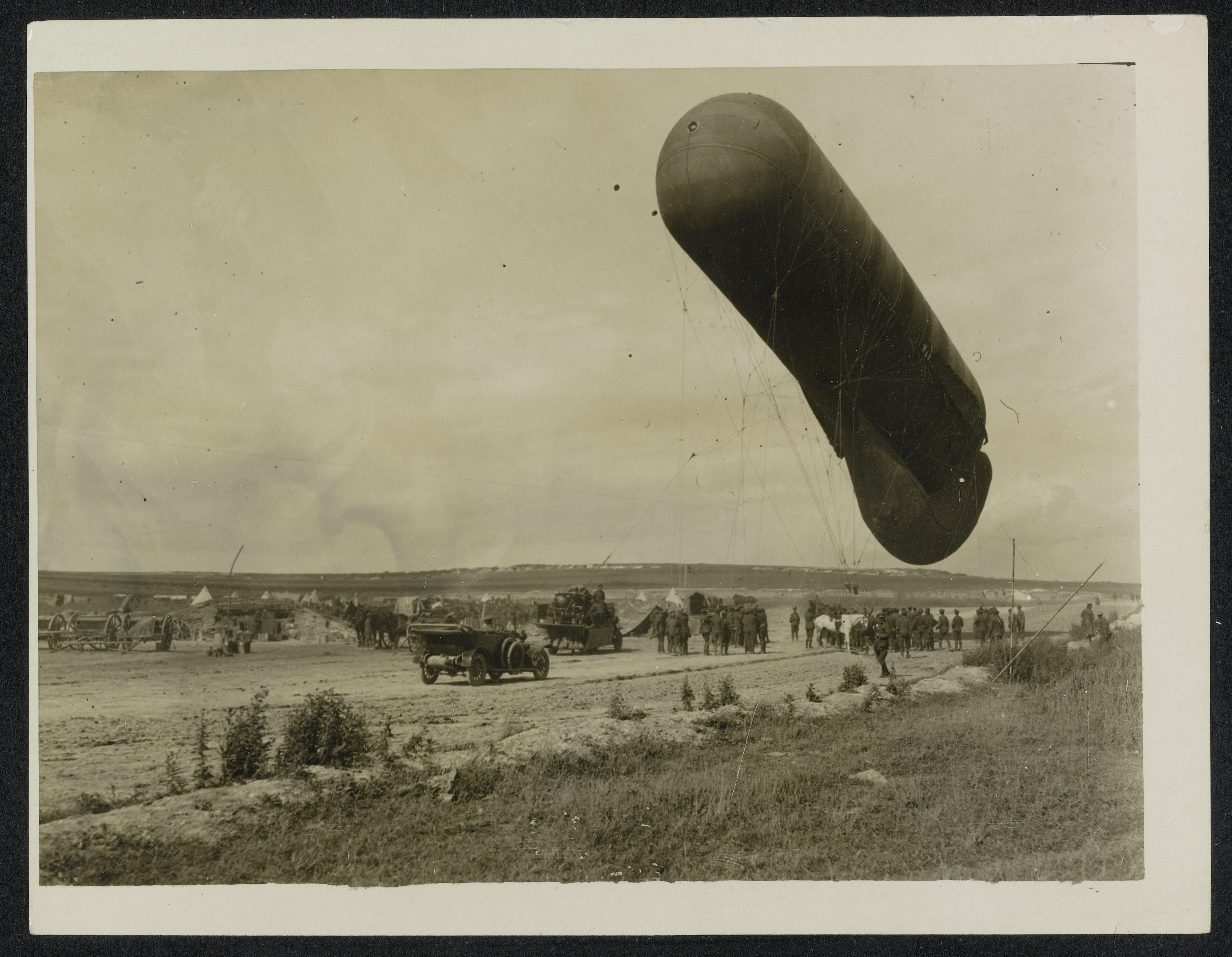 Kite balloon descending